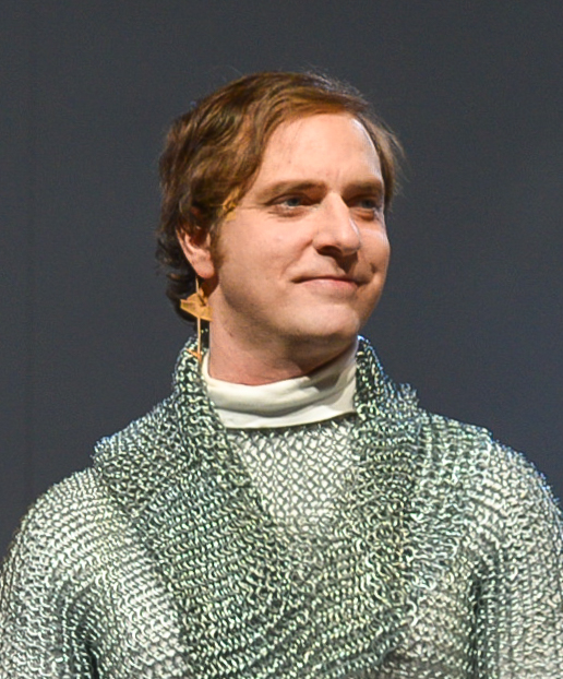 Kung Lear handlar om en makthavare som tappat greppet och hemfaller åt sin fåfänga. Rollen som Kung Lear är Sven Wollters avsked till teatern.